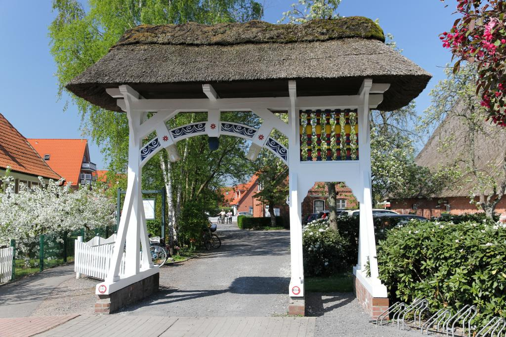 Prunkpforte in Grünendeich.